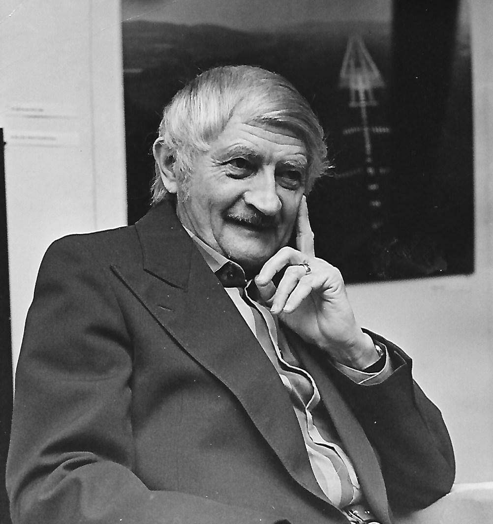 Foto